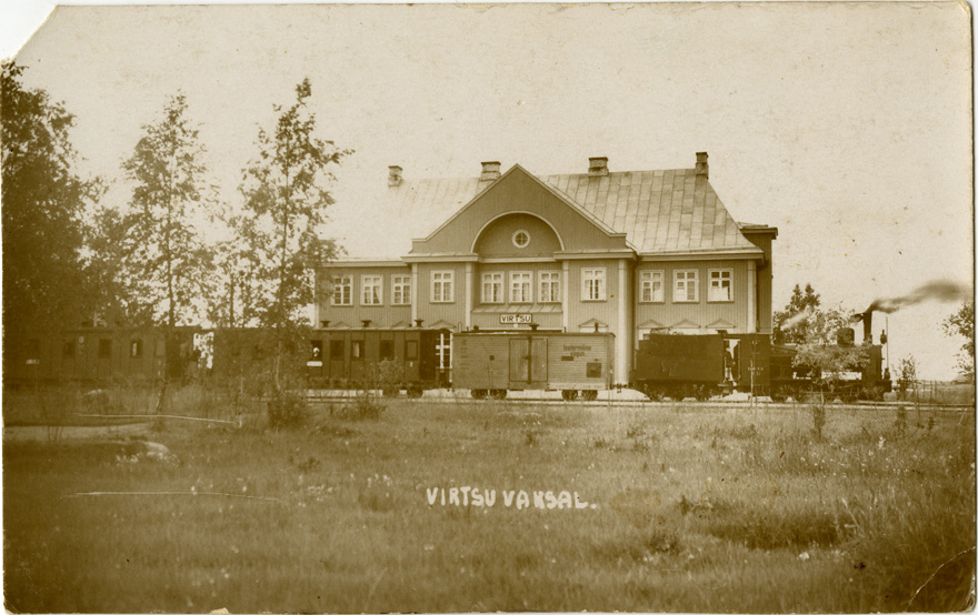 Virtsu raudteejaama reisijatehoone ja kitsarööpmeline rong. This image on crowdsourcing geotagging platform Ajapaik